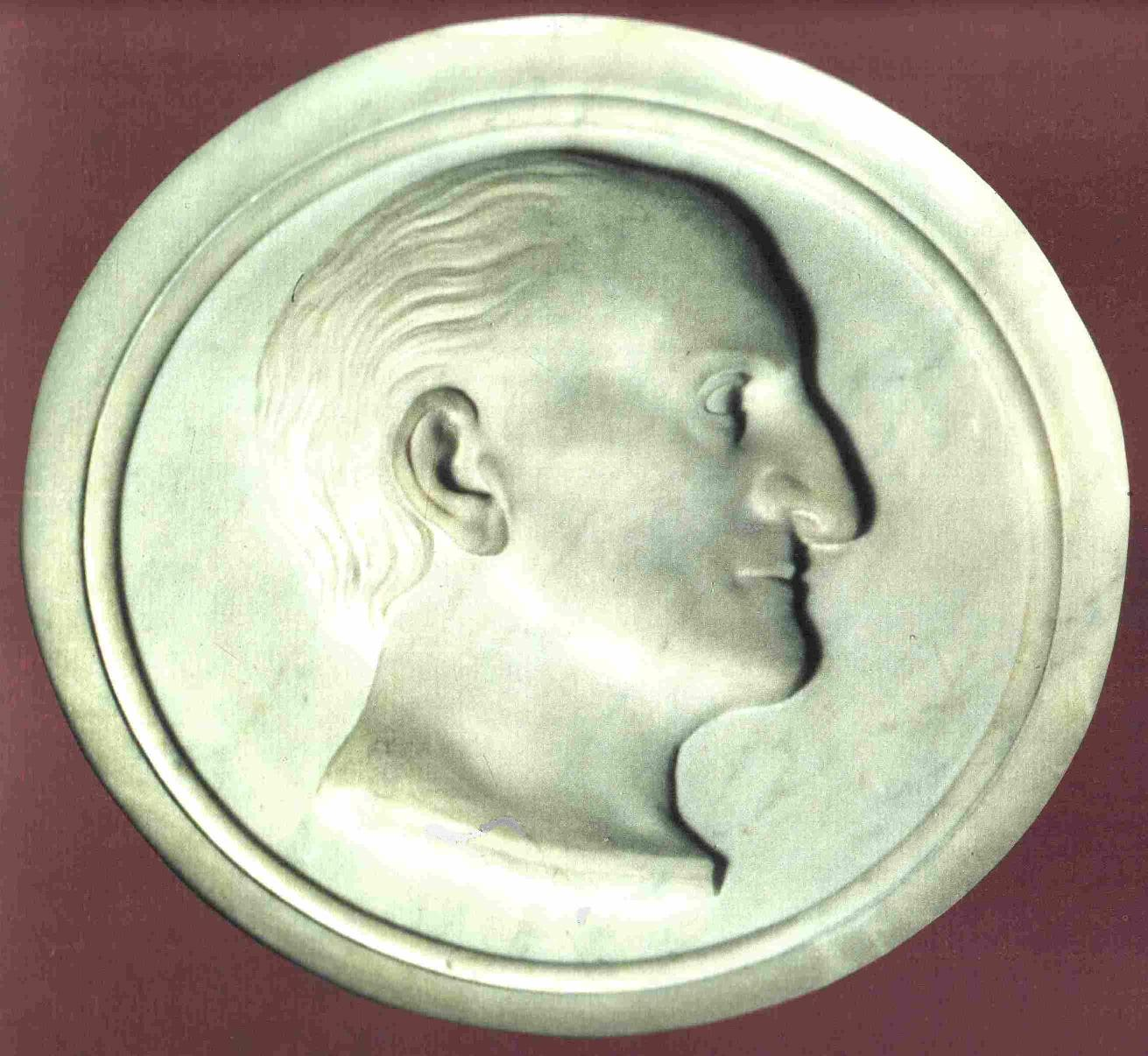 Nicola Bettoli (1780-1854), architetto parmigiano. Bassorilievo presso chiesa di San Giovanni Evangelista, Parma.